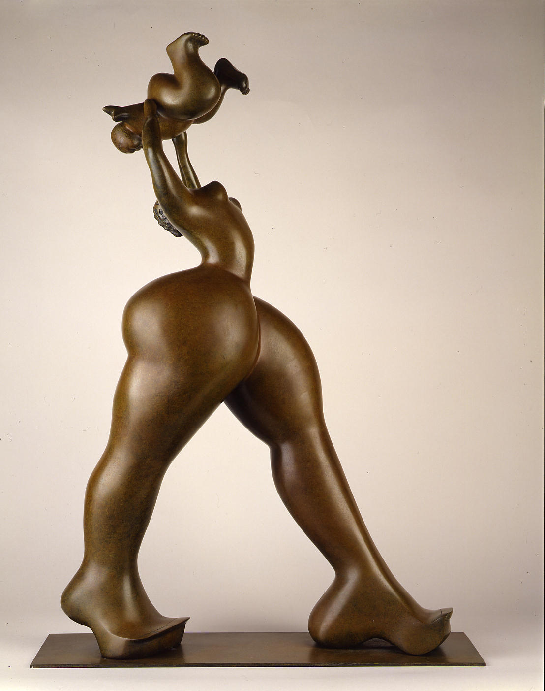 Statue Bronze